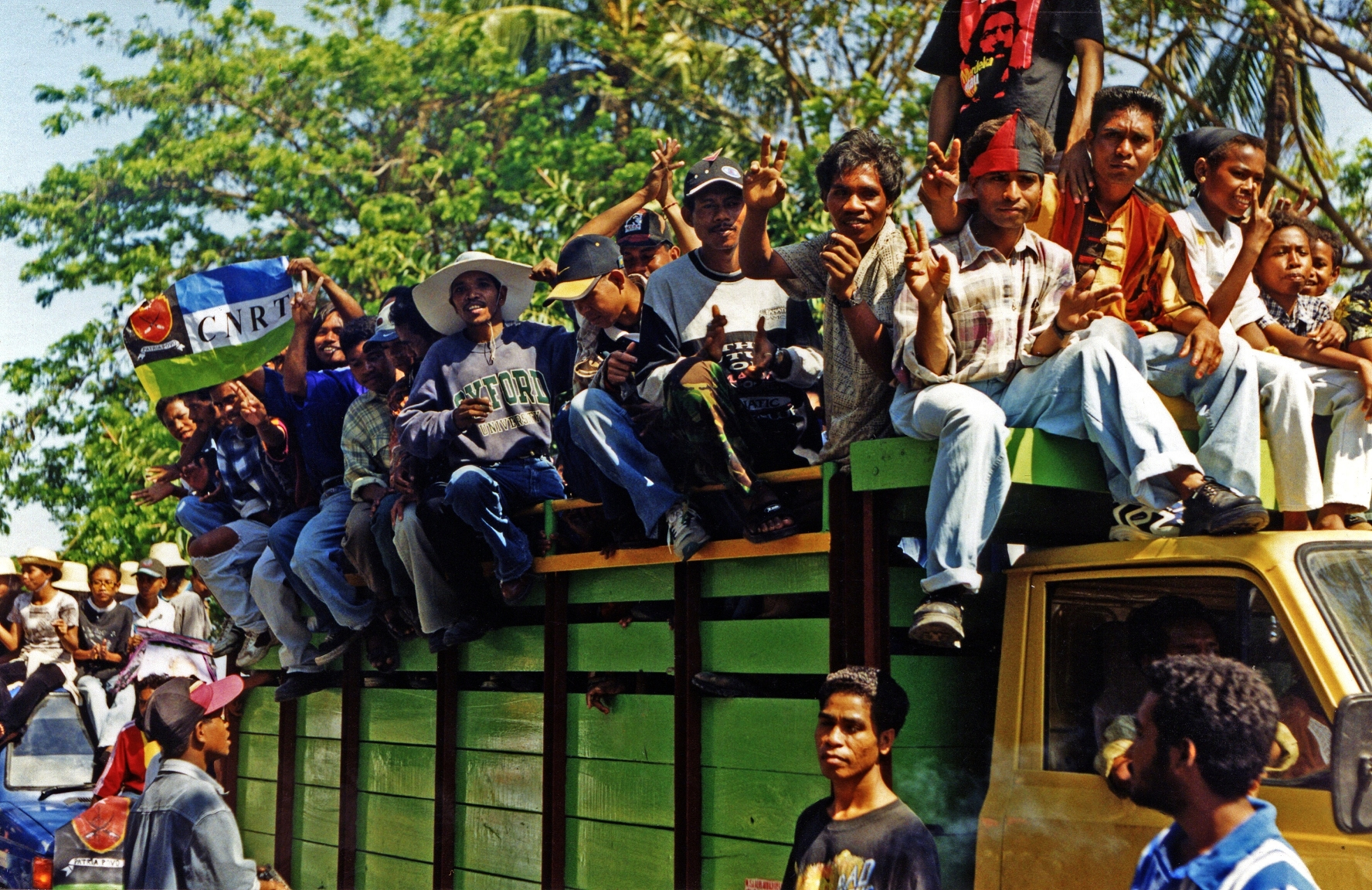 CNRT-Veranstaltung zum Unabhängigkeitsreferendum in Osttimor 1999 in Dili